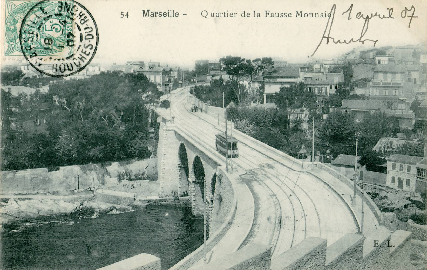 Carte postale ancienne éditée par EL N°54Marseille : Le quartier de la Fausse-MonnaieAncien tramway sur le viaduc de la Fausse-Monnaie, construit en 1863 sur l'anse de la Fausse-Monnaie.